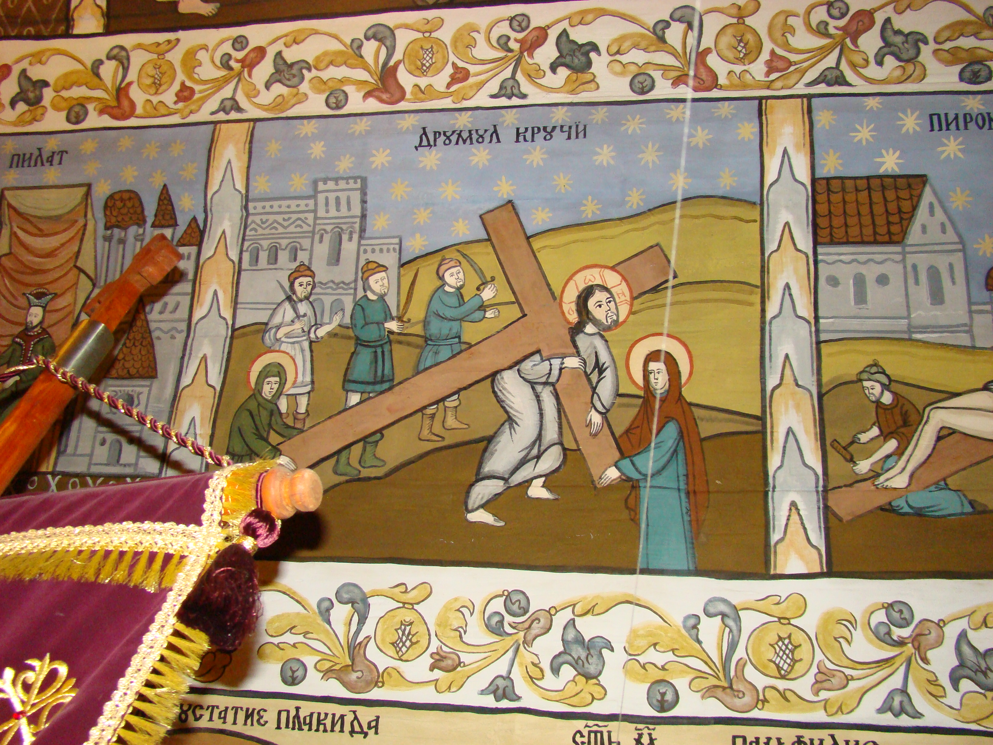 Biserica de lemn „Sf. Trei Ierarhi" din Ghighișeni mutată la Cucuceni